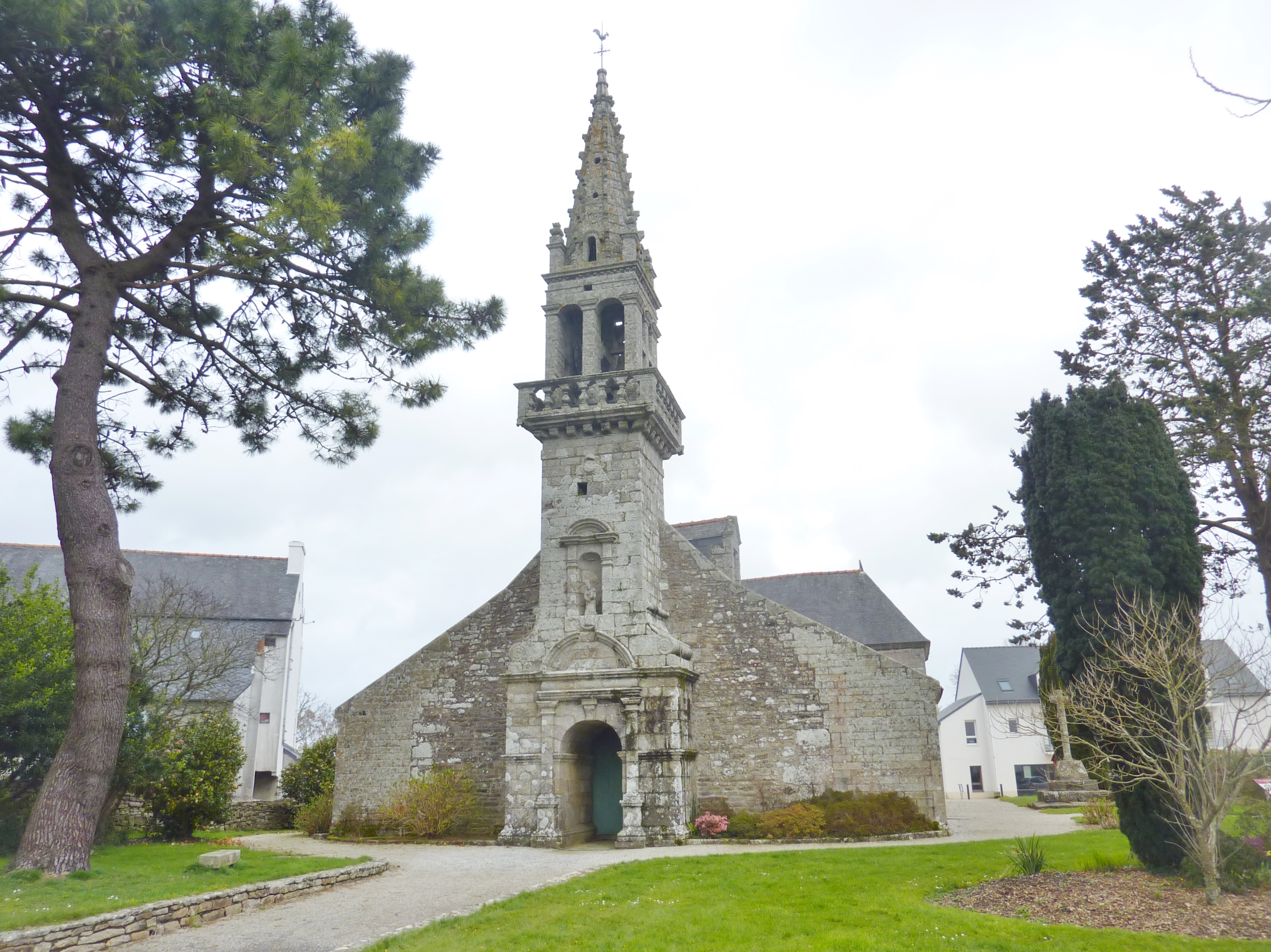 Gouesnach : église paroissiale Saint-Pierre, vue extérieure d'ensemble (la façade). Les traces de l'élargissement des deux bas-côtés, réalisé à la fin du XIXe siècle, sont nettement visibles.